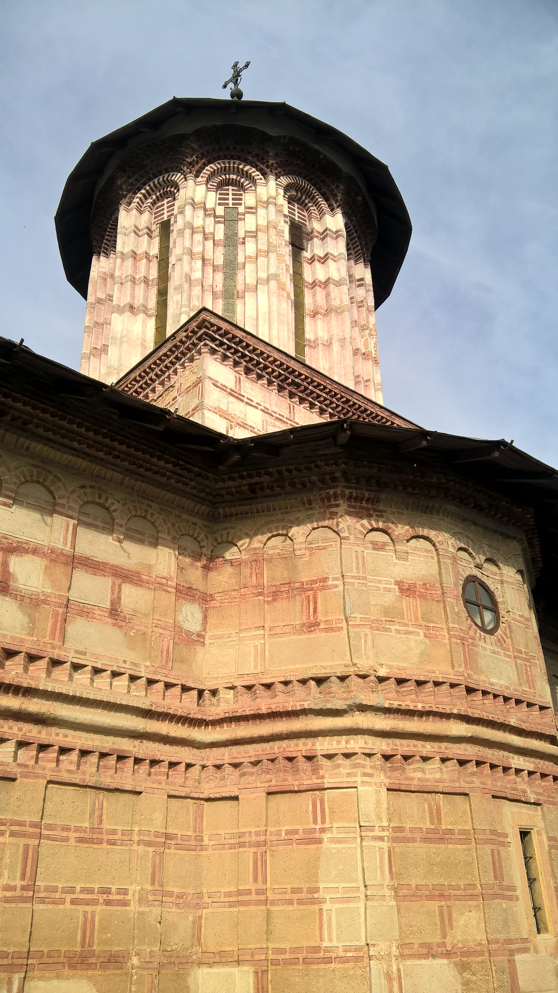 Biserica „Sf. Nicolae” 01